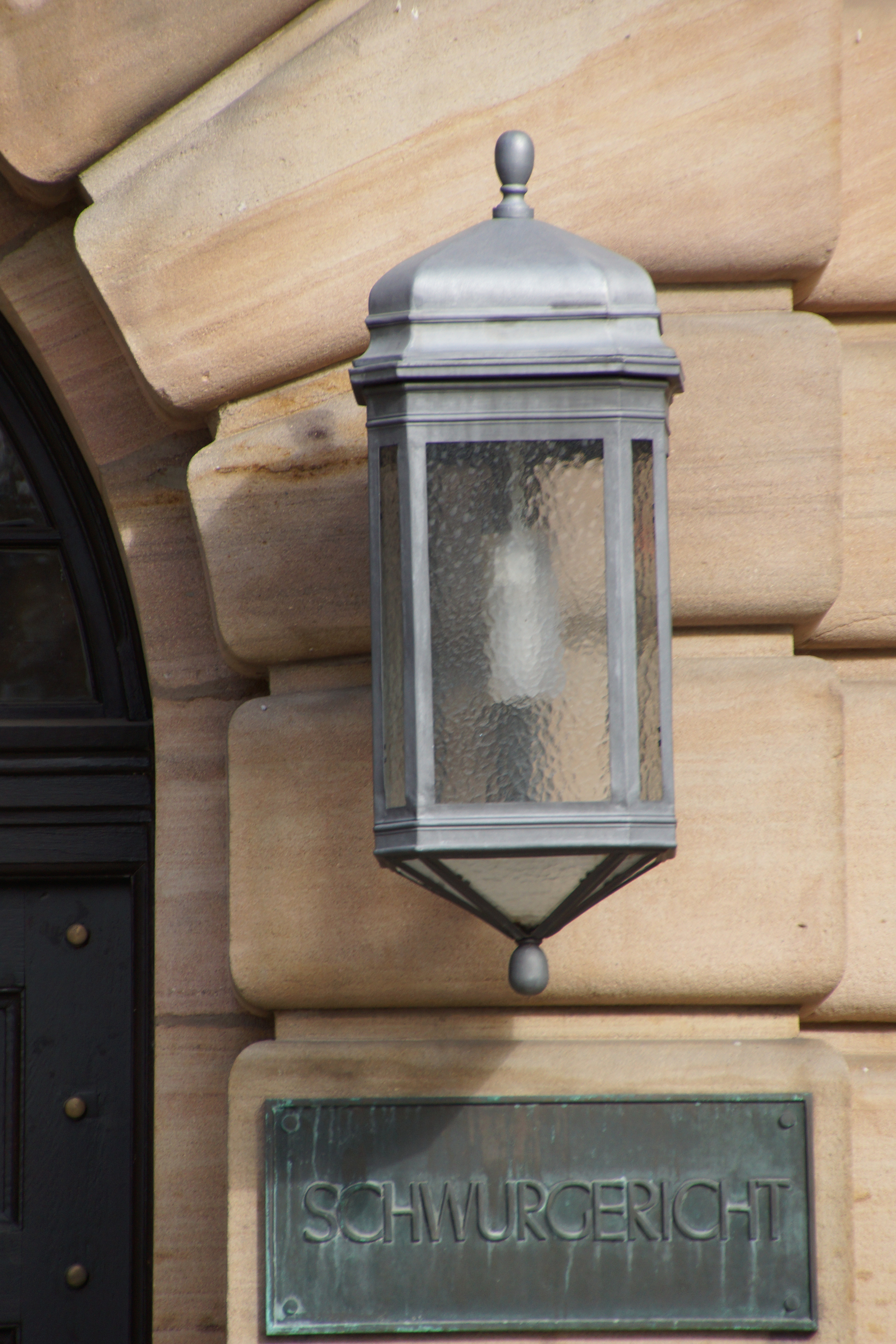 Der Justizpalast in der Fürther Straße in Nürnberg